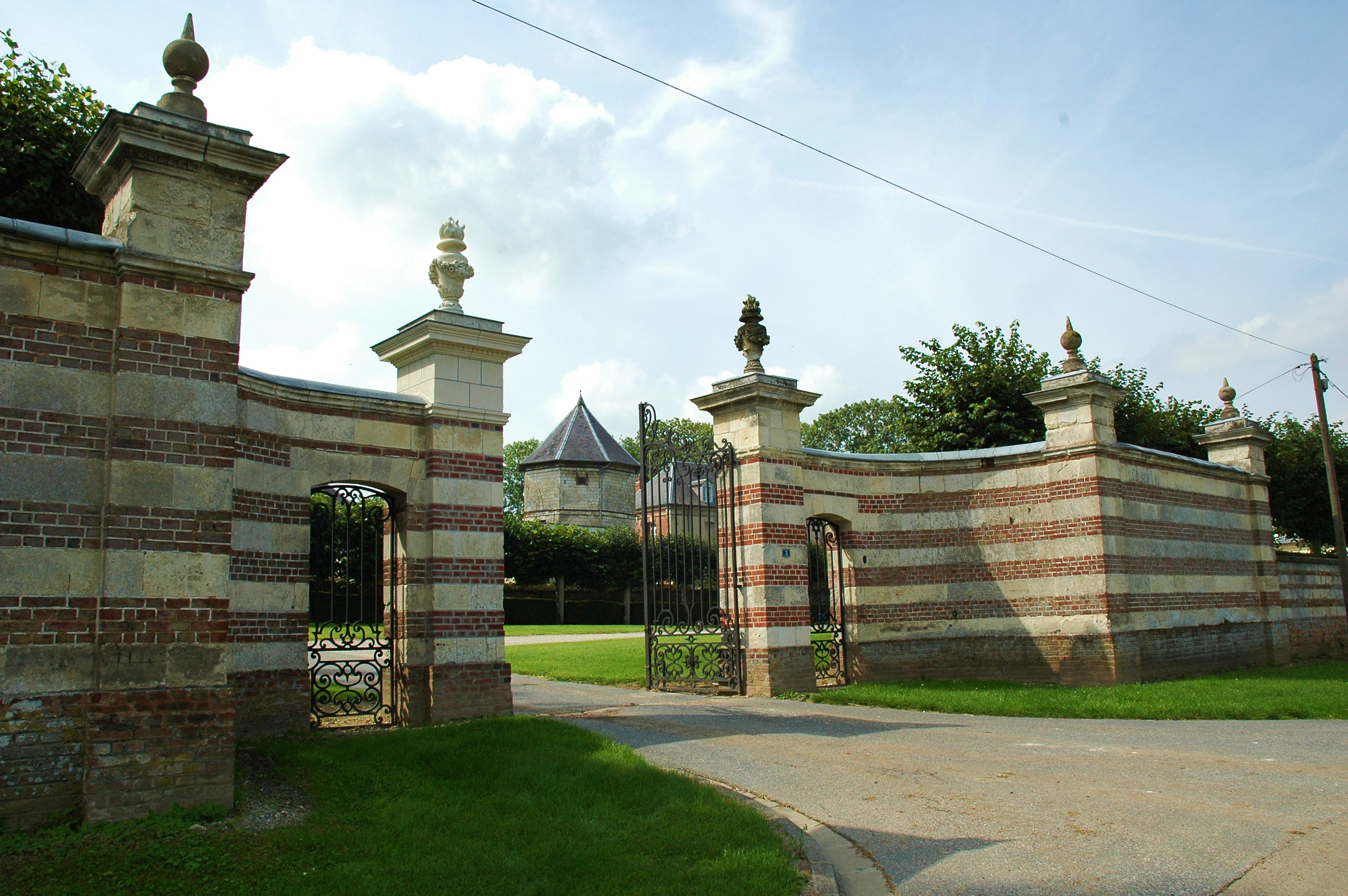 Marieux (Somme, France). L'entrée du château vue sous un angle permettant d'apercevoir le colombier.